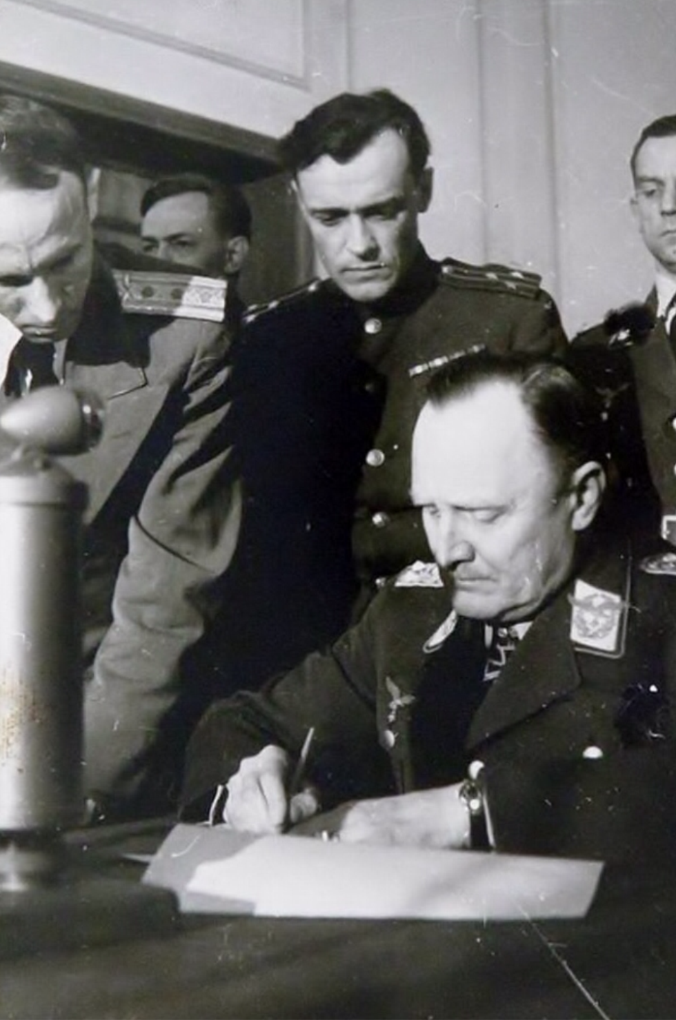 Полковник А.М. Коротков и генерал-полковник Г.-Ю. Штумпф во время подписания Акта о капитуляции Германии